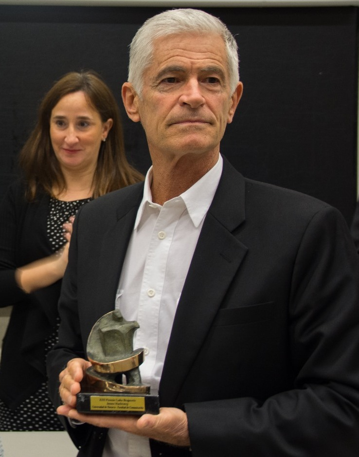 James Nachtwey, premio Luka Brajnovic (2015)